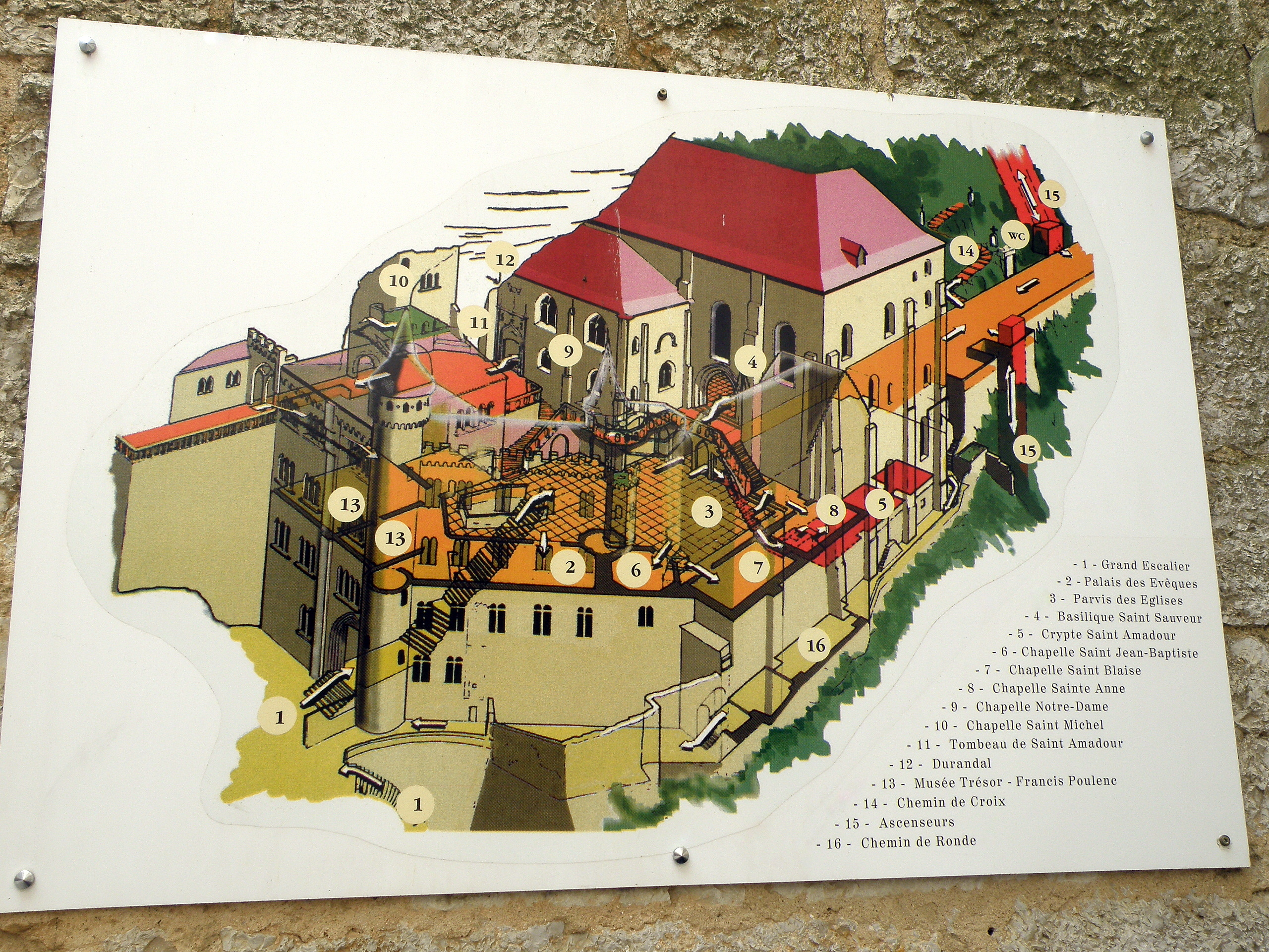 Rocamadour (Lot) : plan du site. Copyright : municipalité de Rocamadour.